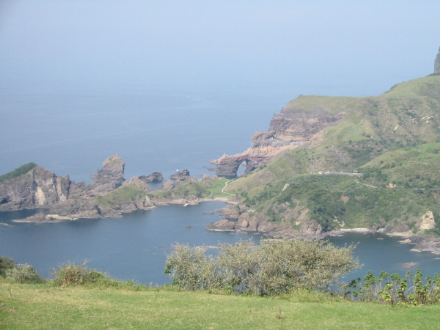 赤尾展望所から見た国賀海岸（島根県隠岐郡西ノ島町）Oki Kuniga Coast, Okinoshima, Shimane, Japan